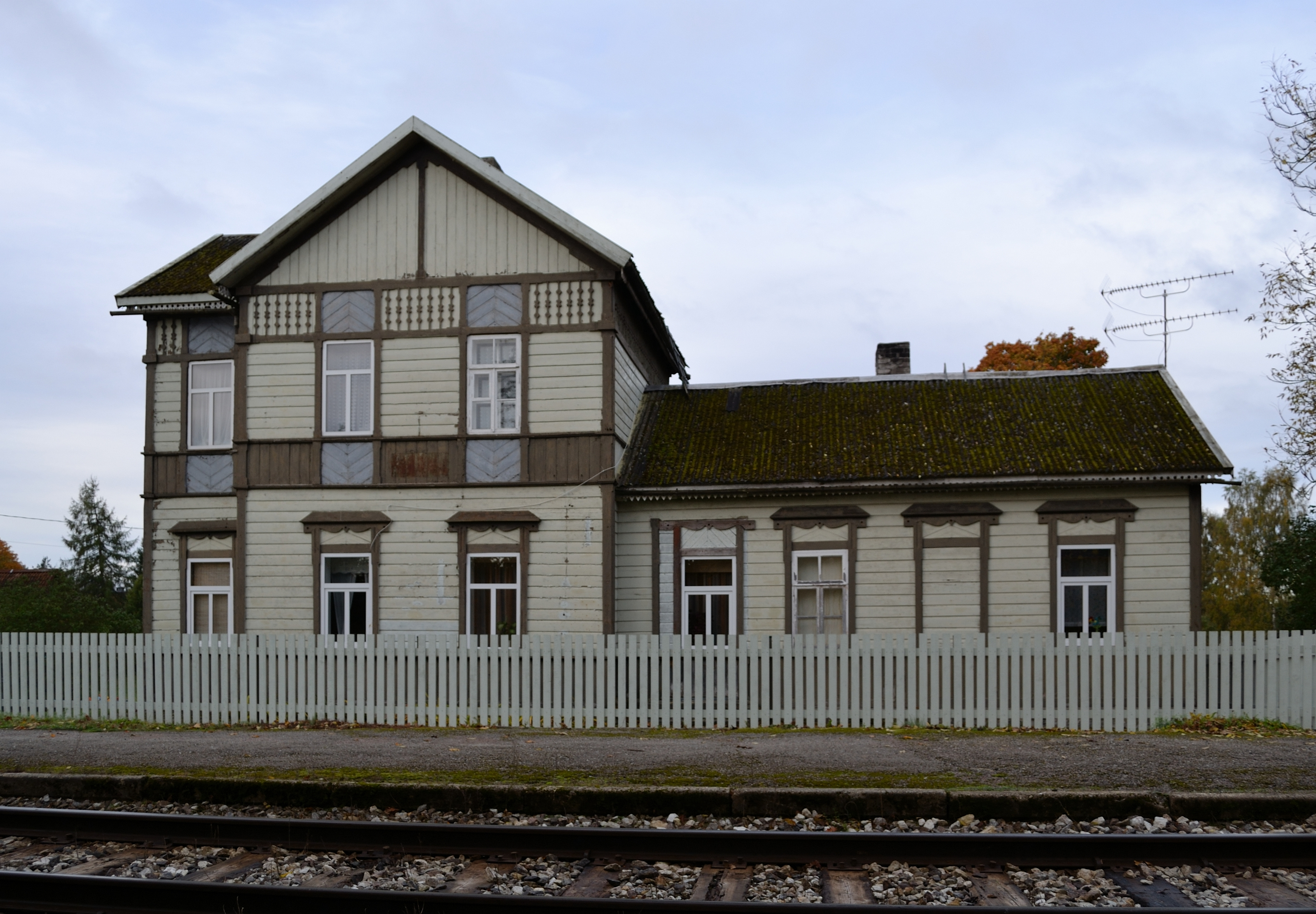 Keava elamu-jaamahoone